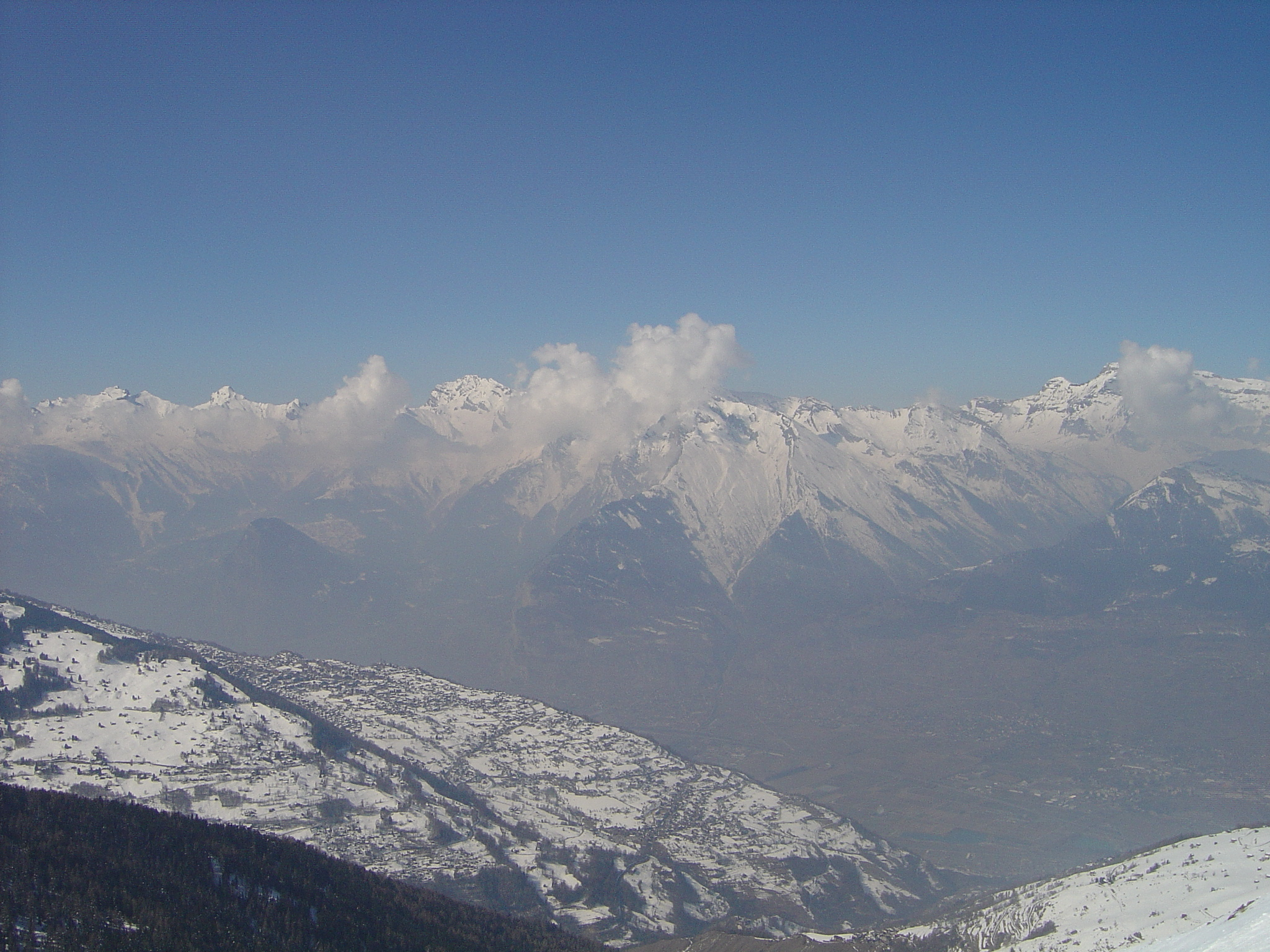 Vue sur Nendaz (Valais). Photo prise depuis le sommet des pistes de Veysonnaz. Auteur : Aimée